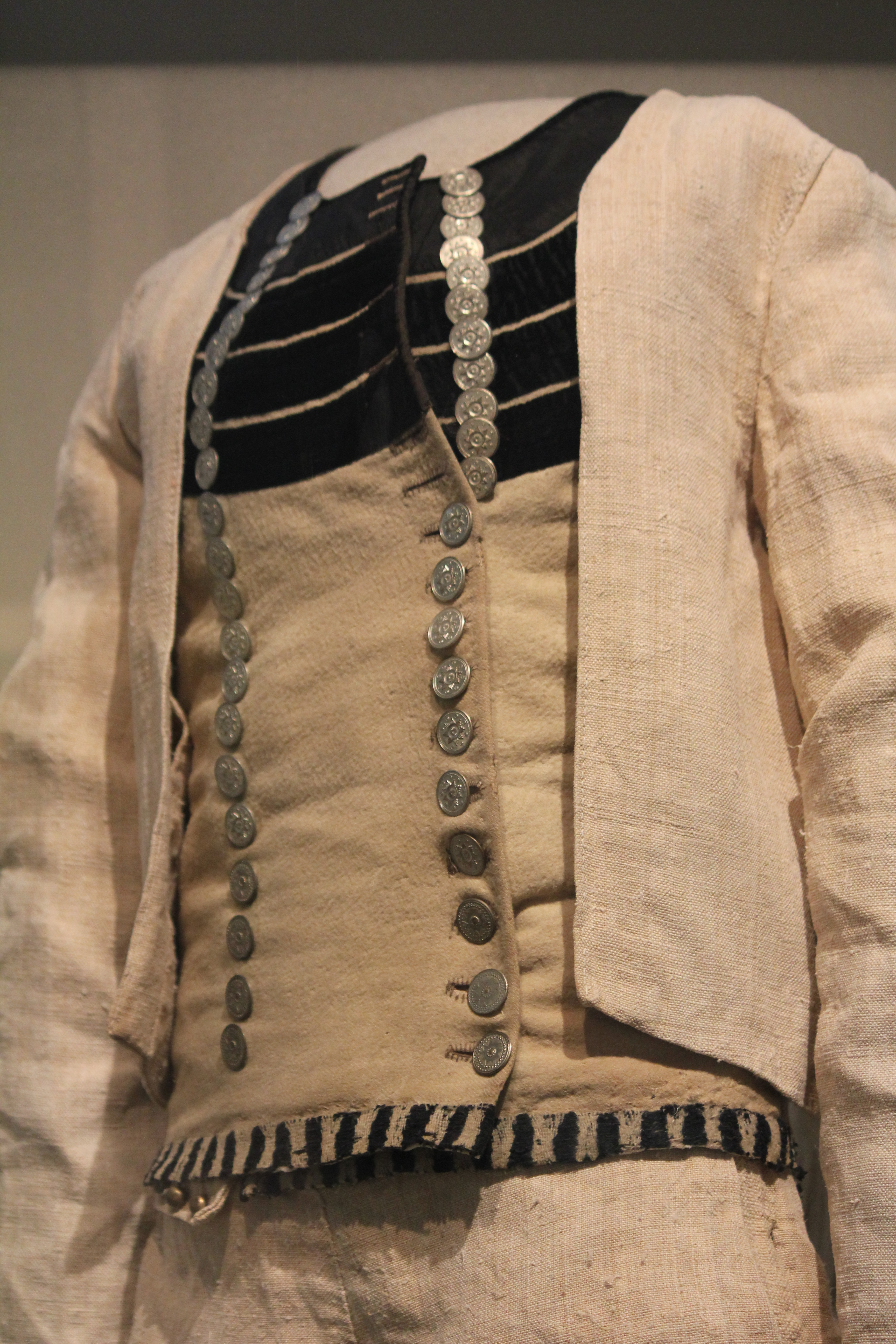 veste d'homme, Bretagne (Pontivy ?), début du XXe